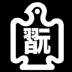 「寒雀の中に翫」紋（染抜）